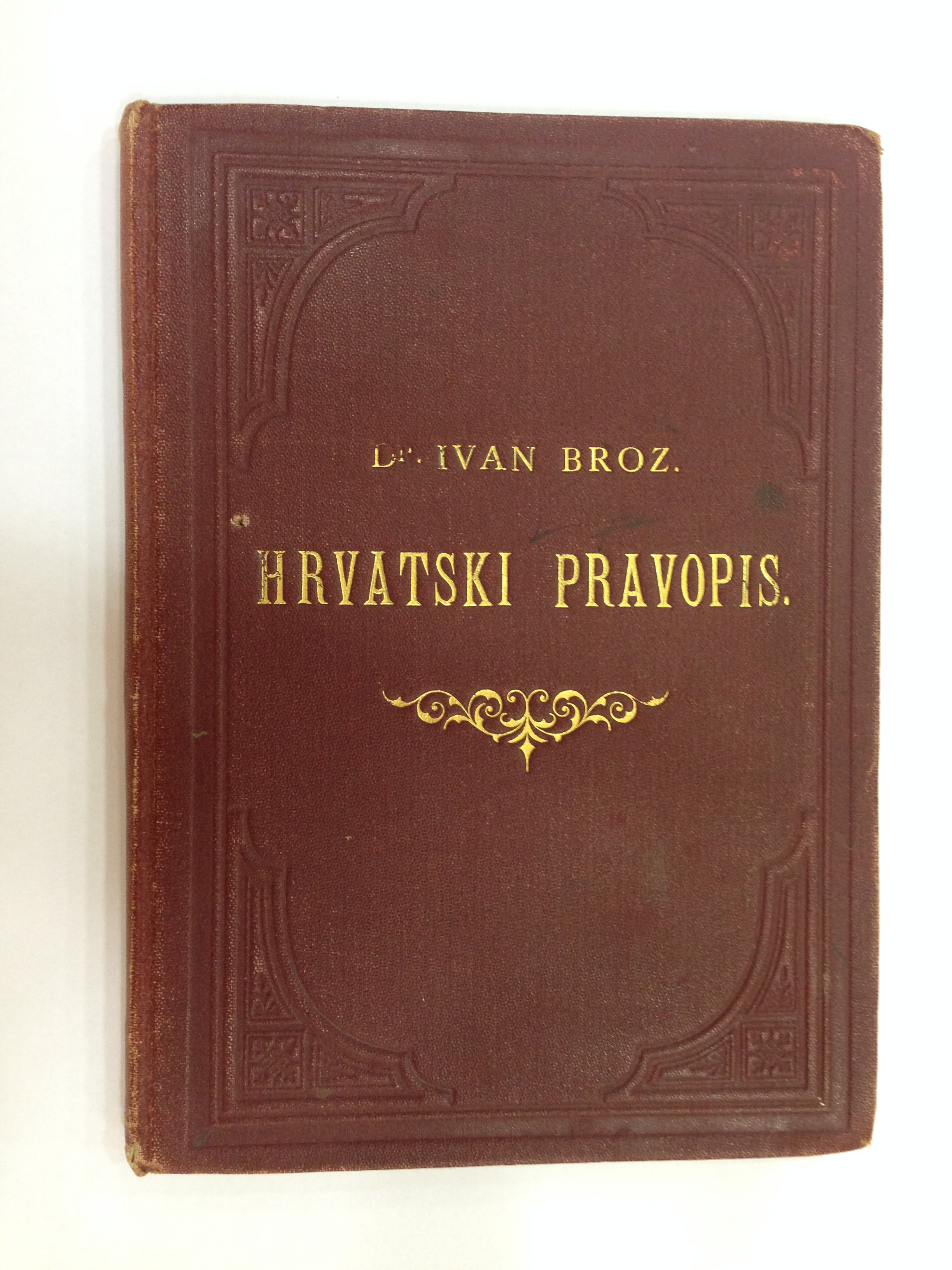 Ivan Broz, Hrvatski pravopis, 1892.